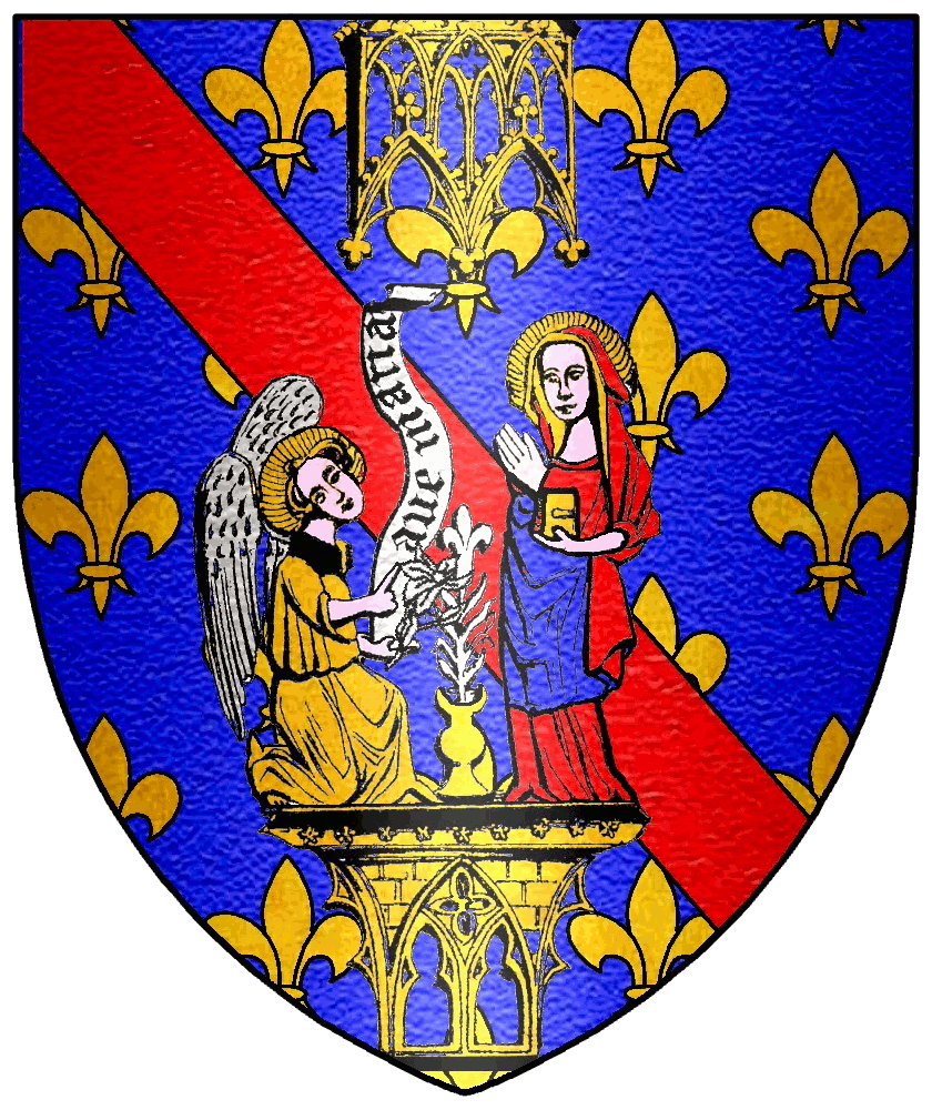 Armes du chapitre cathédral de Moulins (France)